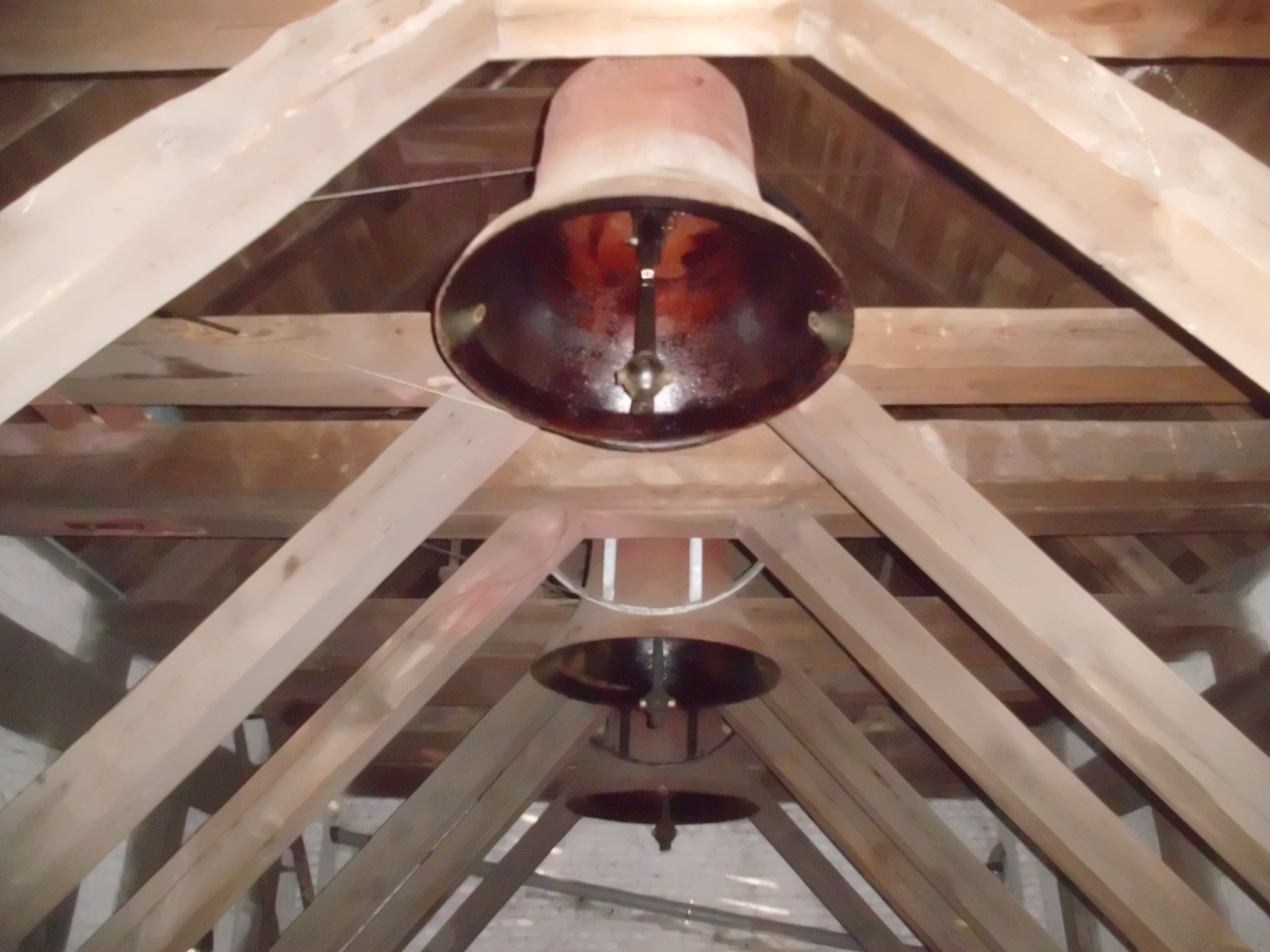 Die Glocken der Kreuzkirche (Berlin-Mahlsdorf)